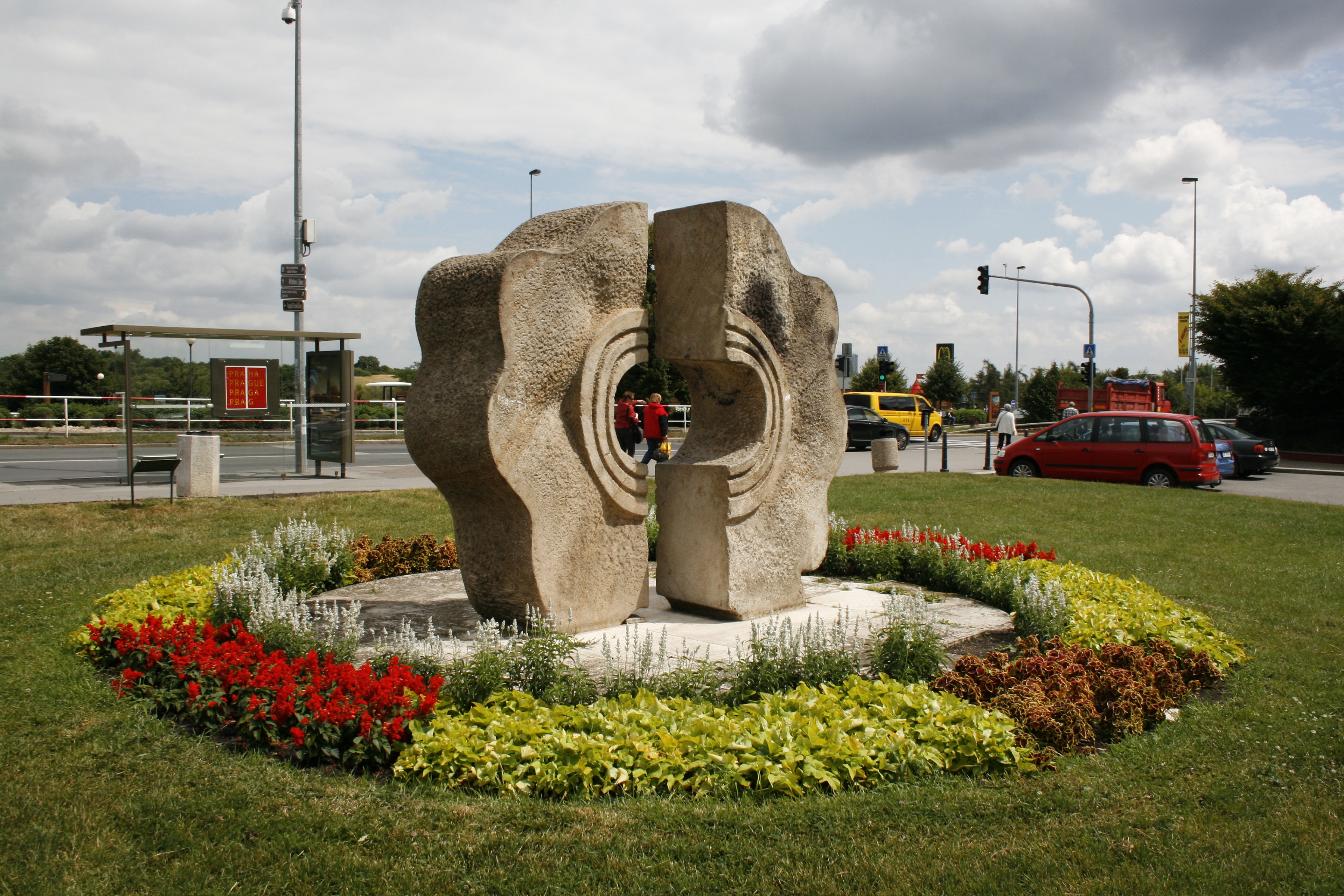 Praha, Liboc - skulptura Kamenný květ Zdeny Fibichové mezi ulicemi Evropská a Vlastina